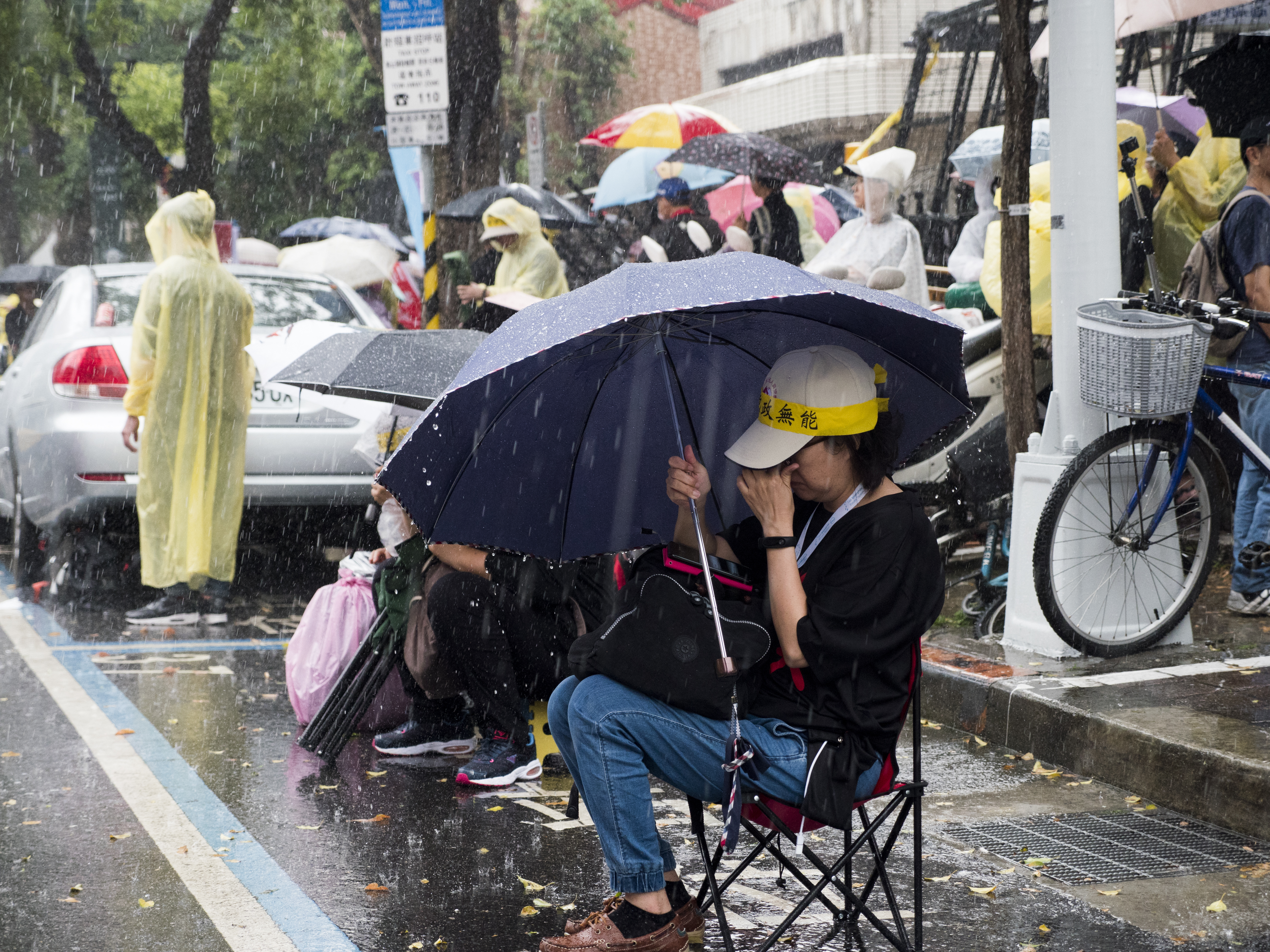 419反年金改革抗議